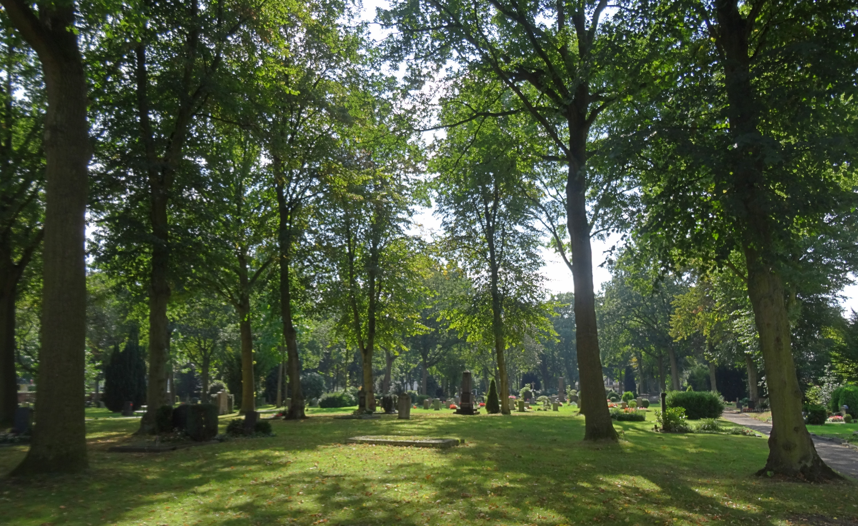 Buntentorsfriedhof in Bremen, Buntentorsteinweg 65Die Gesamtanlage ist ein geschütztes Kulturdenkmal in der Freien Hansestadt Bremen, mit der Nr. 5154 beim Landesamt für Denkmalpflege registriert.